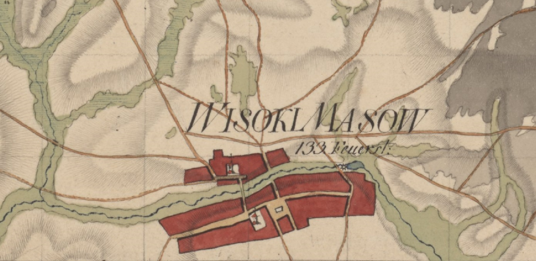 Mapę Nowych Prus Wschodnich sporządzono na 122 arkuszach o formacie 72 x 50 cm, w skali ok. 1: 33 300 (1 : 33 333) + redukcja mapy 11 arkuszy, różnych formatów w skali ok. 1: 114 000. Inne źródła mówią iż mapę wykonano na 135 arkuszach. Podana liczba na mapie wskazuje ilość budynków. Więcej info na str. 236-237